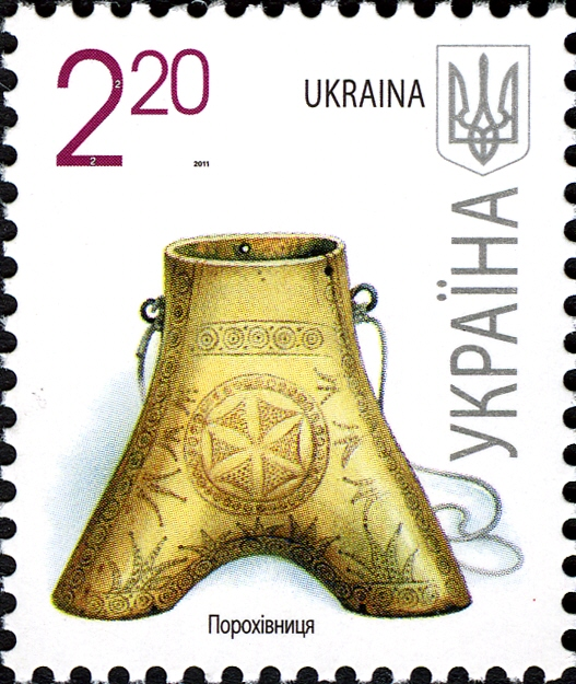 Марка України «Порохівниця». Сьомий випуск стандартних марок